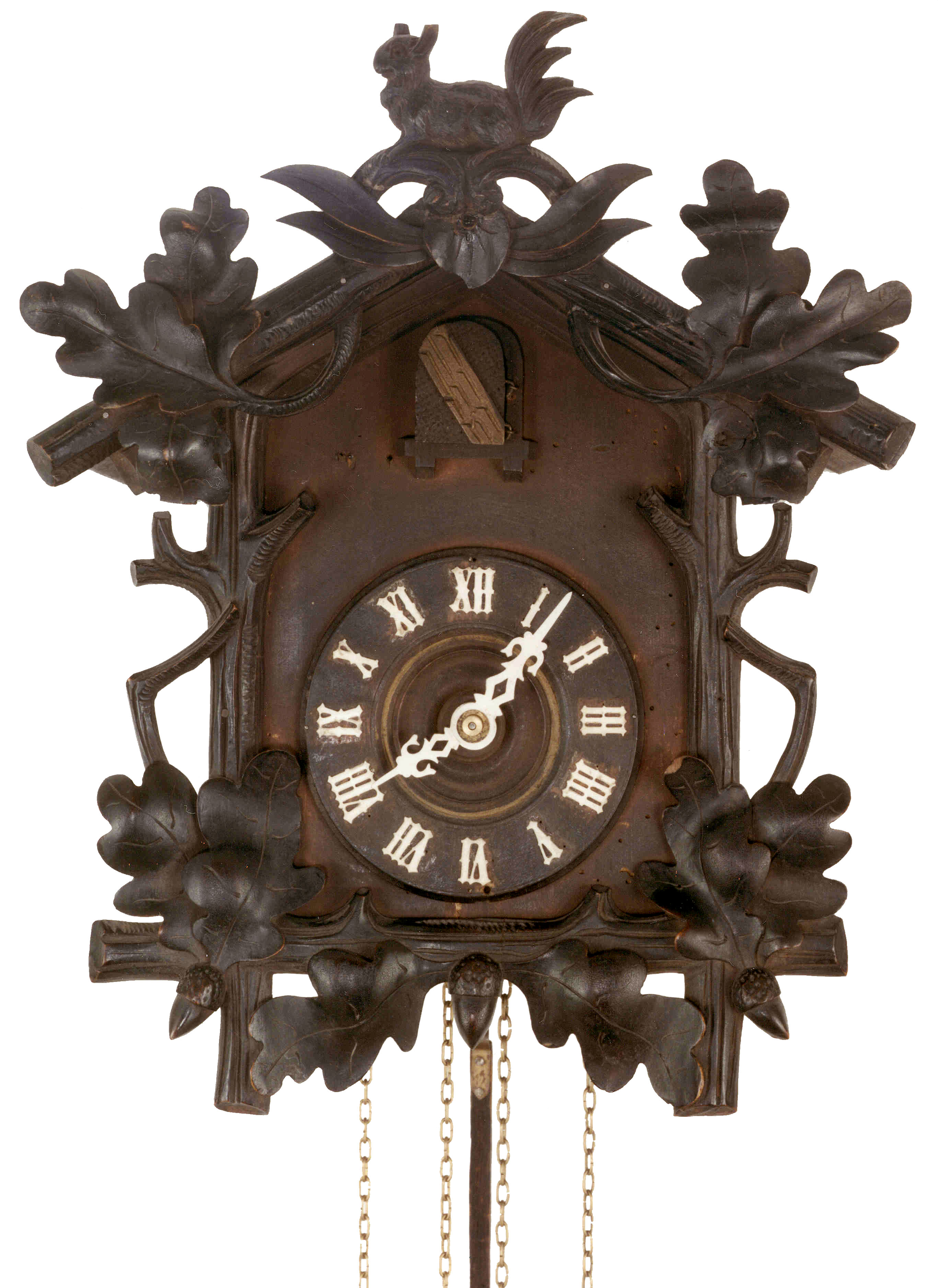 Cuckoo clock, from German wikipedia Bild ist eine Spende des Deutschen Uhrenmuseums Furtwangen, eine Bestätigung dieses Statues wird noch per E-Mail folgen. Das Museum ist mit einer Veröffentlichung unter der GNU FDL einverstanden. I got it from the german clock museum.